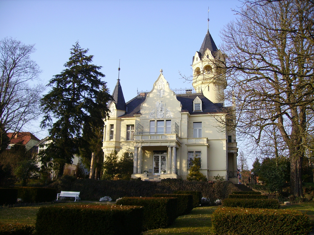 Meyenburg-Kunstmuseum im thüringischen Nordhausen